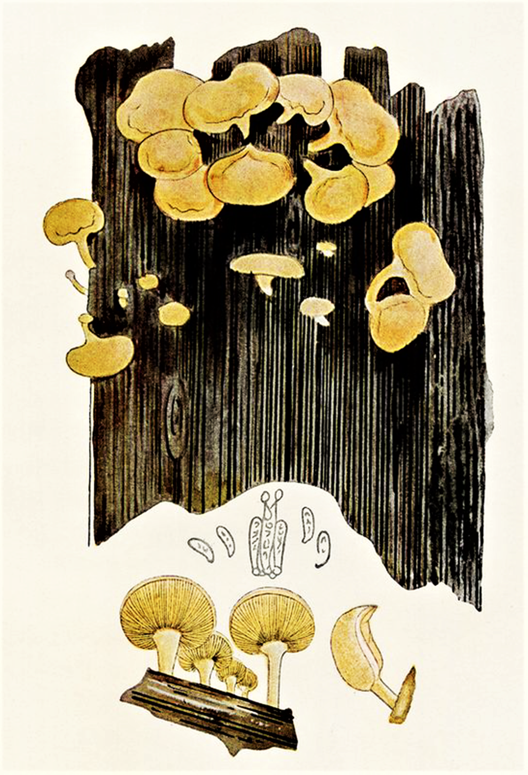 Bres.: Panus stipticus (Bull., 1783) Fr. (1838), heute Panellus stipticus (Bull. 1783) P.Karst. (1879)